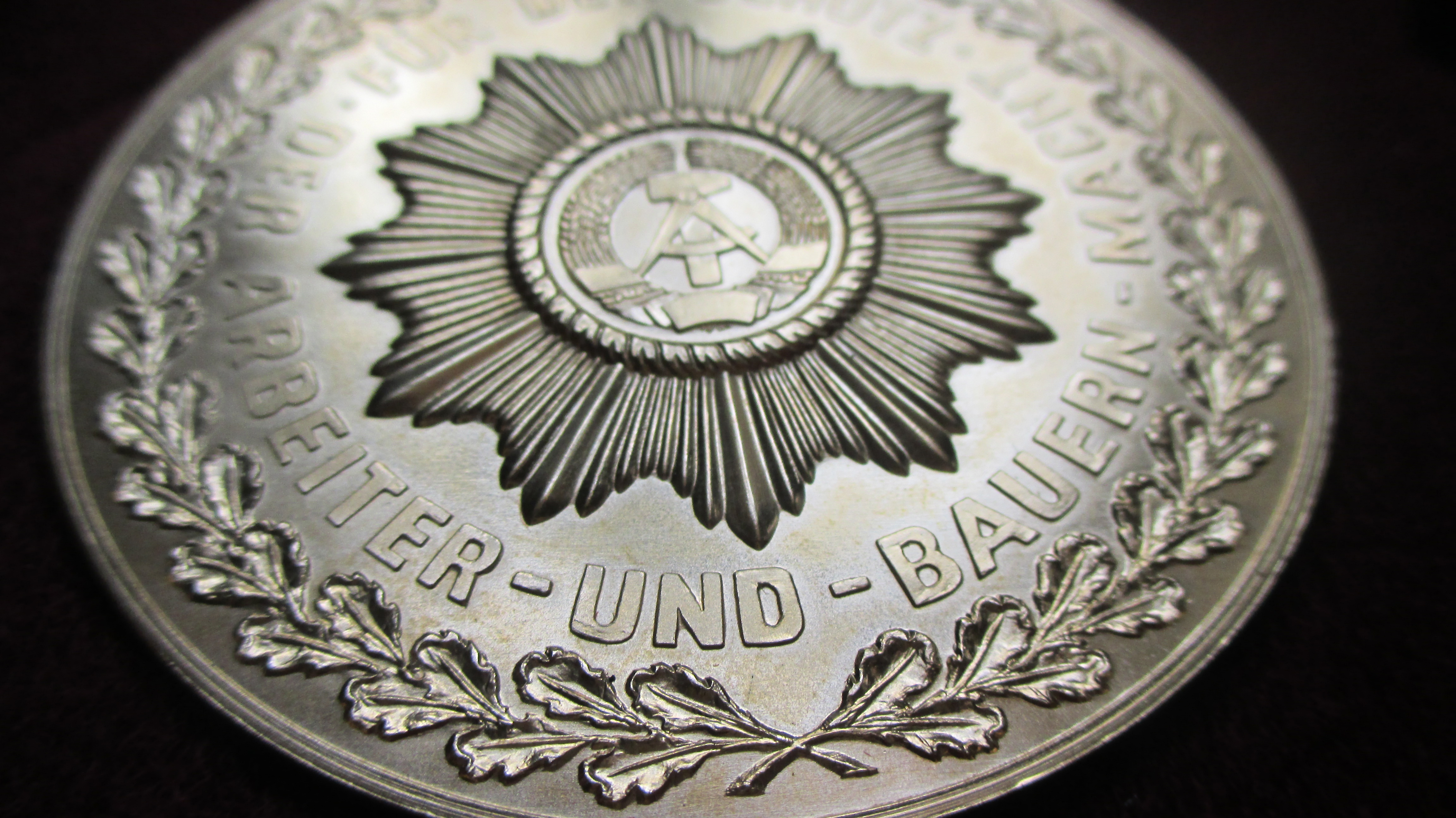 Ehrengeschenk_Ministerium des Innern_ für 30. jährige Dienstzeit in den Organen_Ministerium des Innern_DDR_Auszeichnungsmedaille